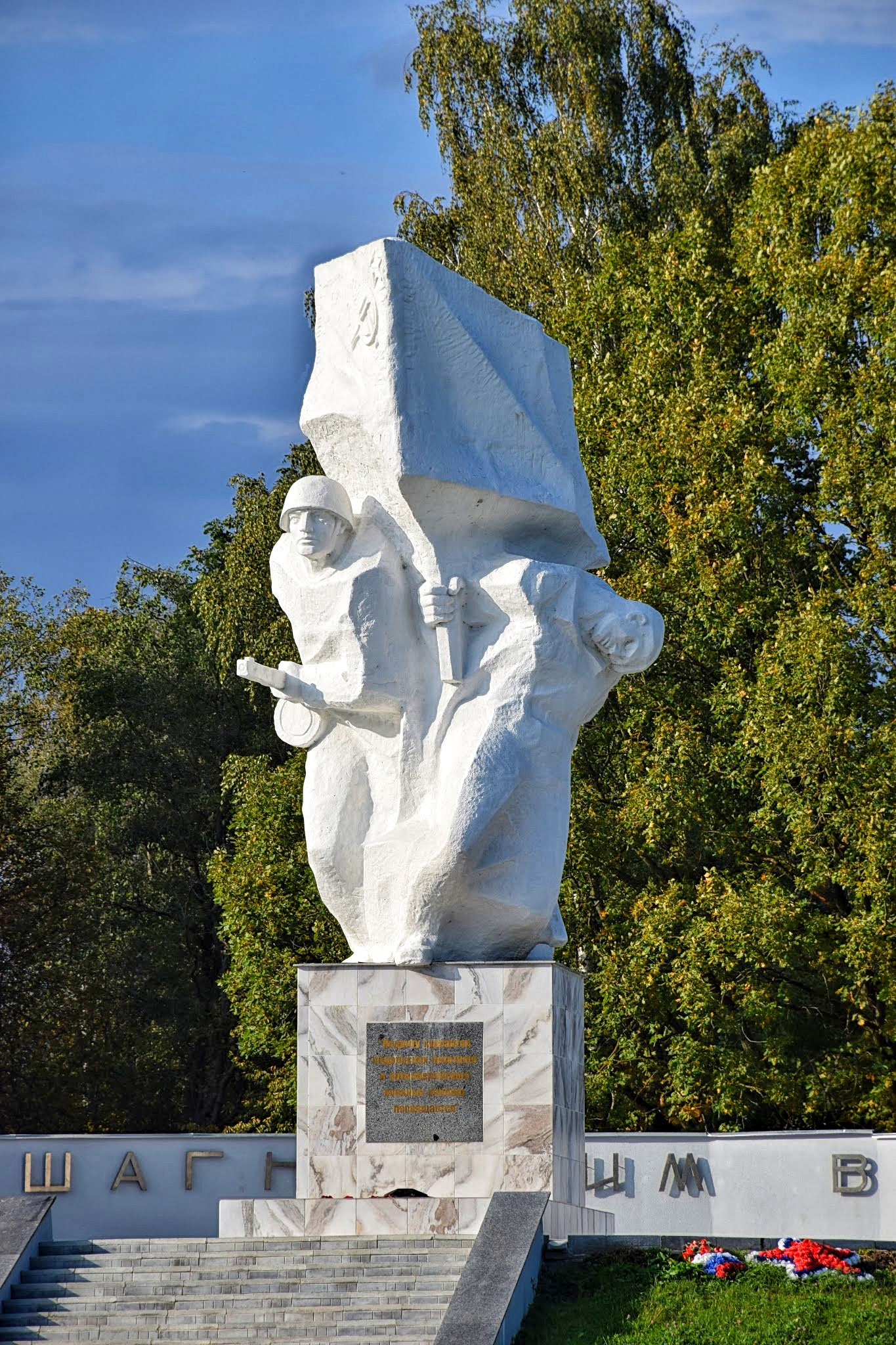 Мемориальный комплекс в честь курсантов подольского пехотного и артиллерийского училищ, погибших в октябре 1941 г. в битве за москву: Ильинское, Малоярославецкий район, Калужская область